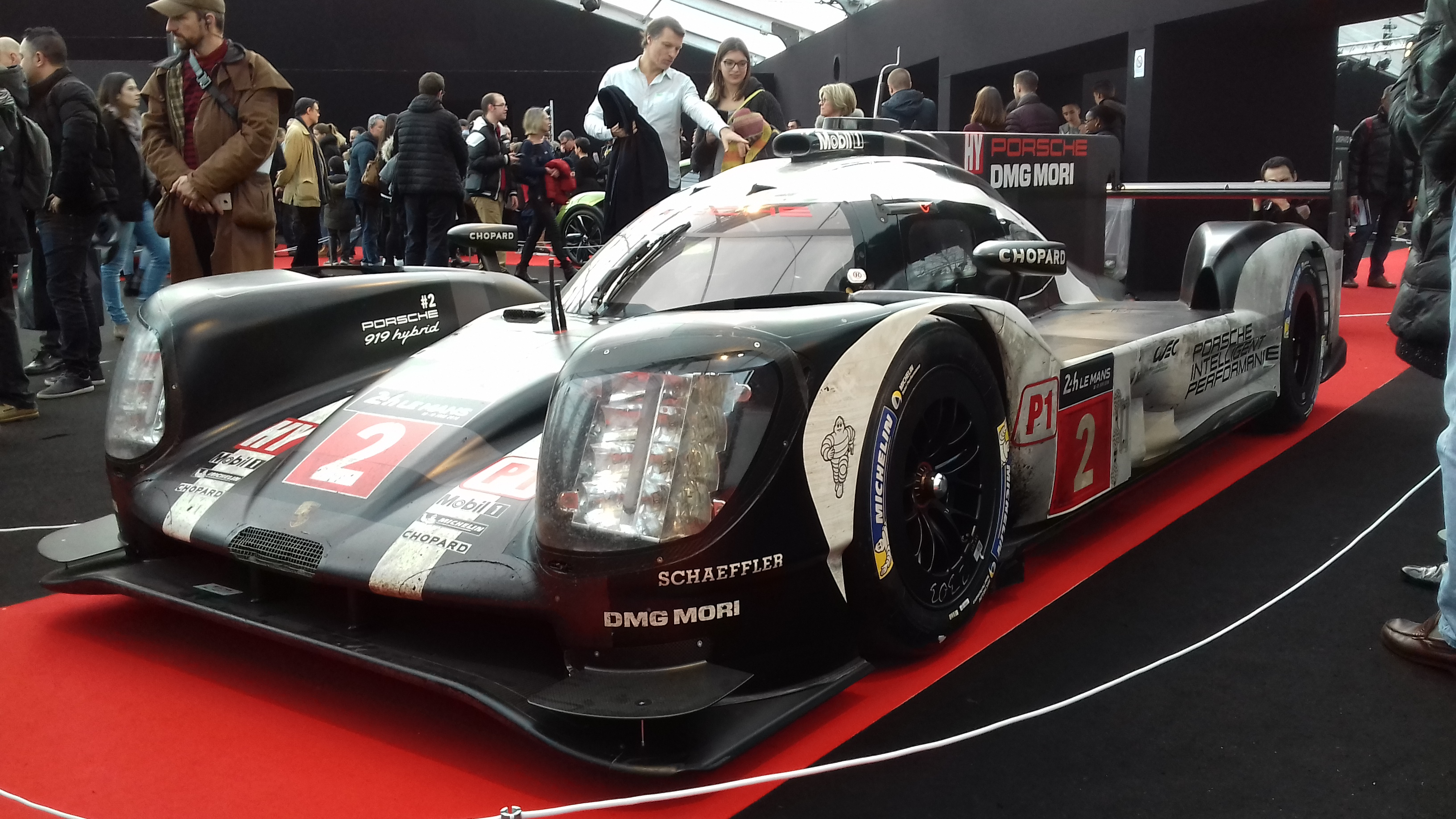 Porsche 919 Hybrid au Festival automobile international 2017